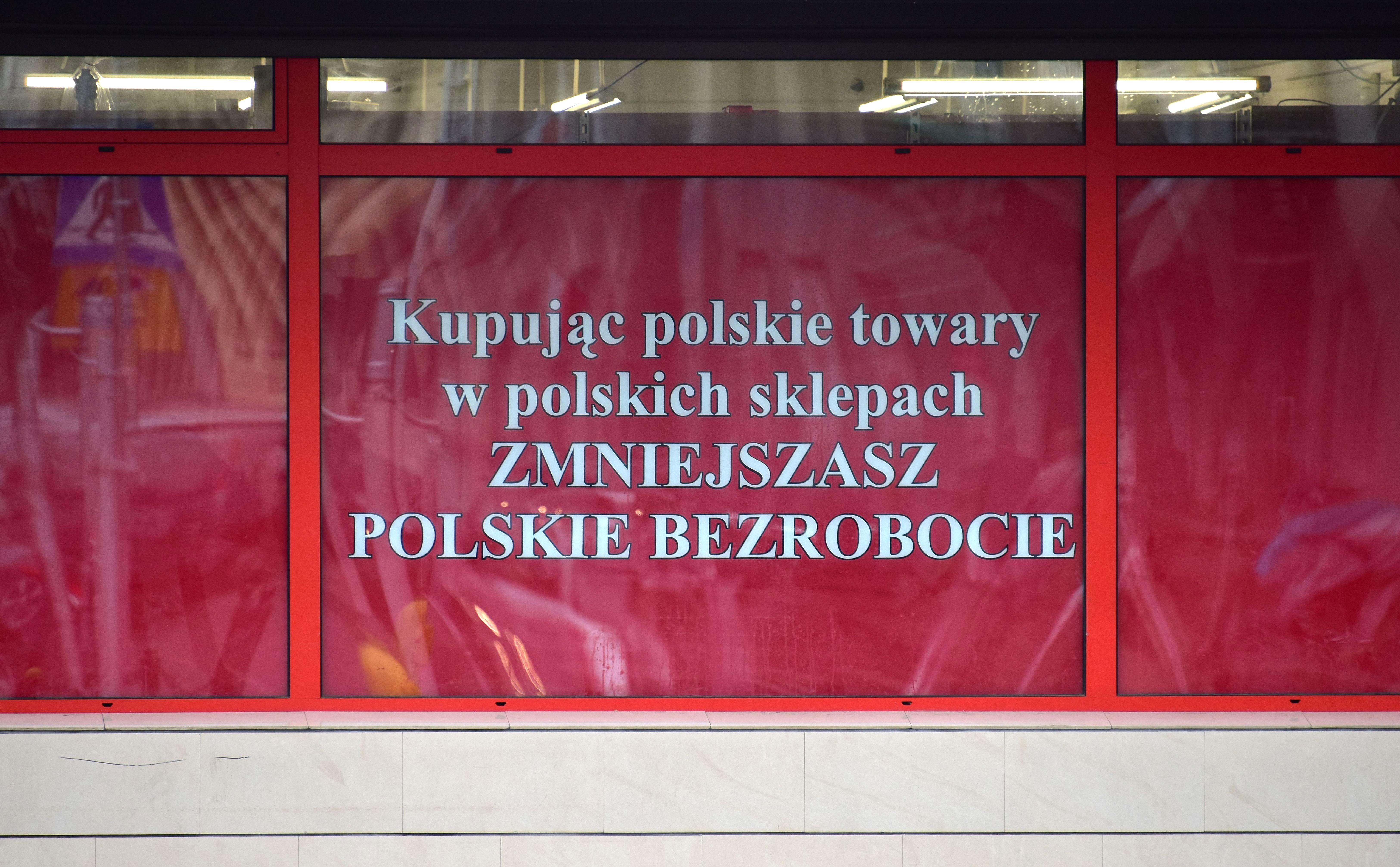 Witryna supersamu Pelcowizna przy ul. Ząbkowskiej 52 w Warszawie